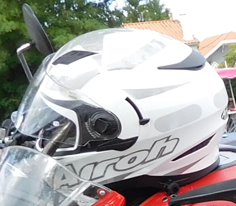 Casque Airoh de moto de route.